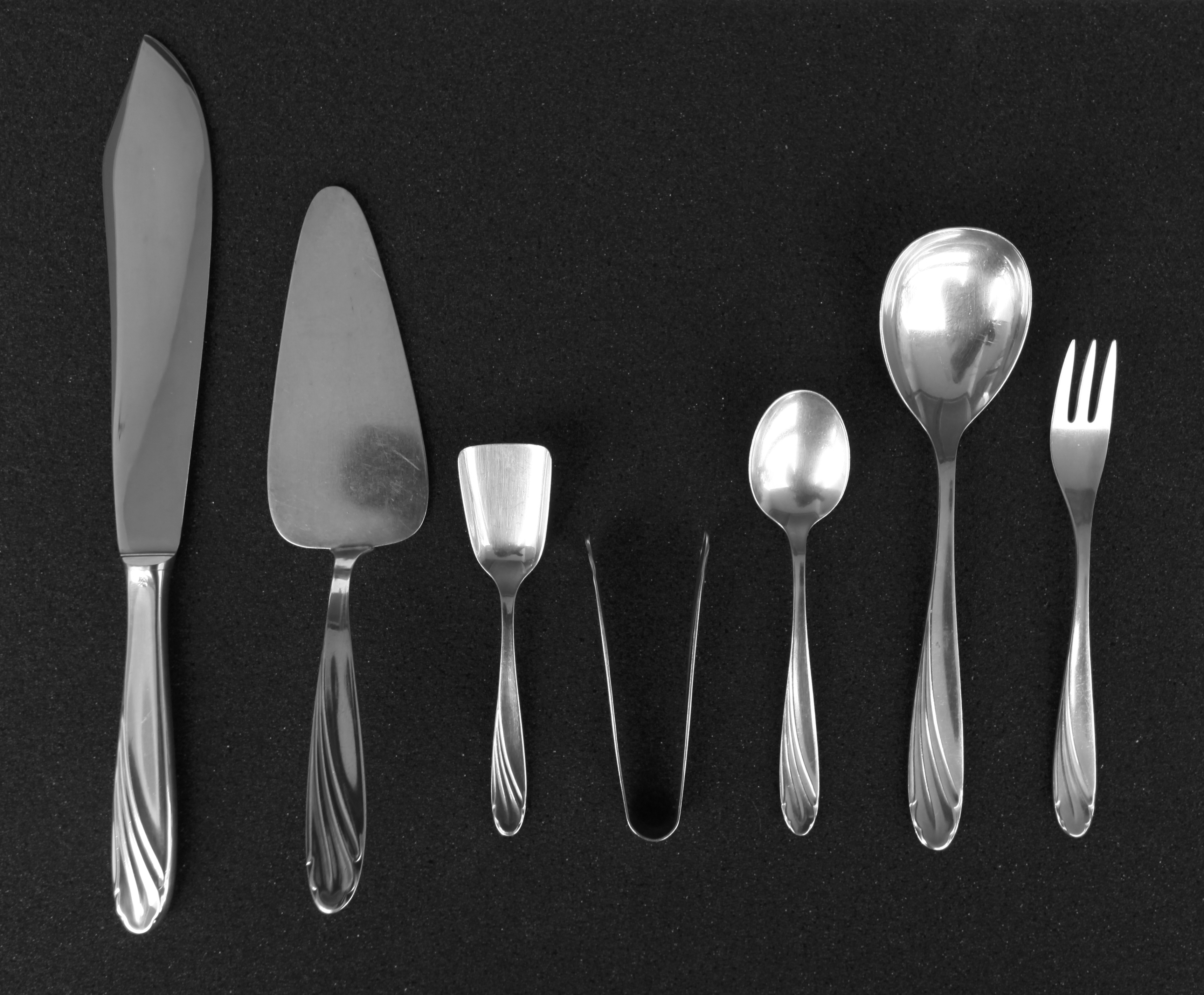 Kaffeebesteck mit Tortenmesser, Kuchenheber, Zuckerschaufel, Zuckerzange, Teelöffel, Sahnelöffel und Kuchengabel.